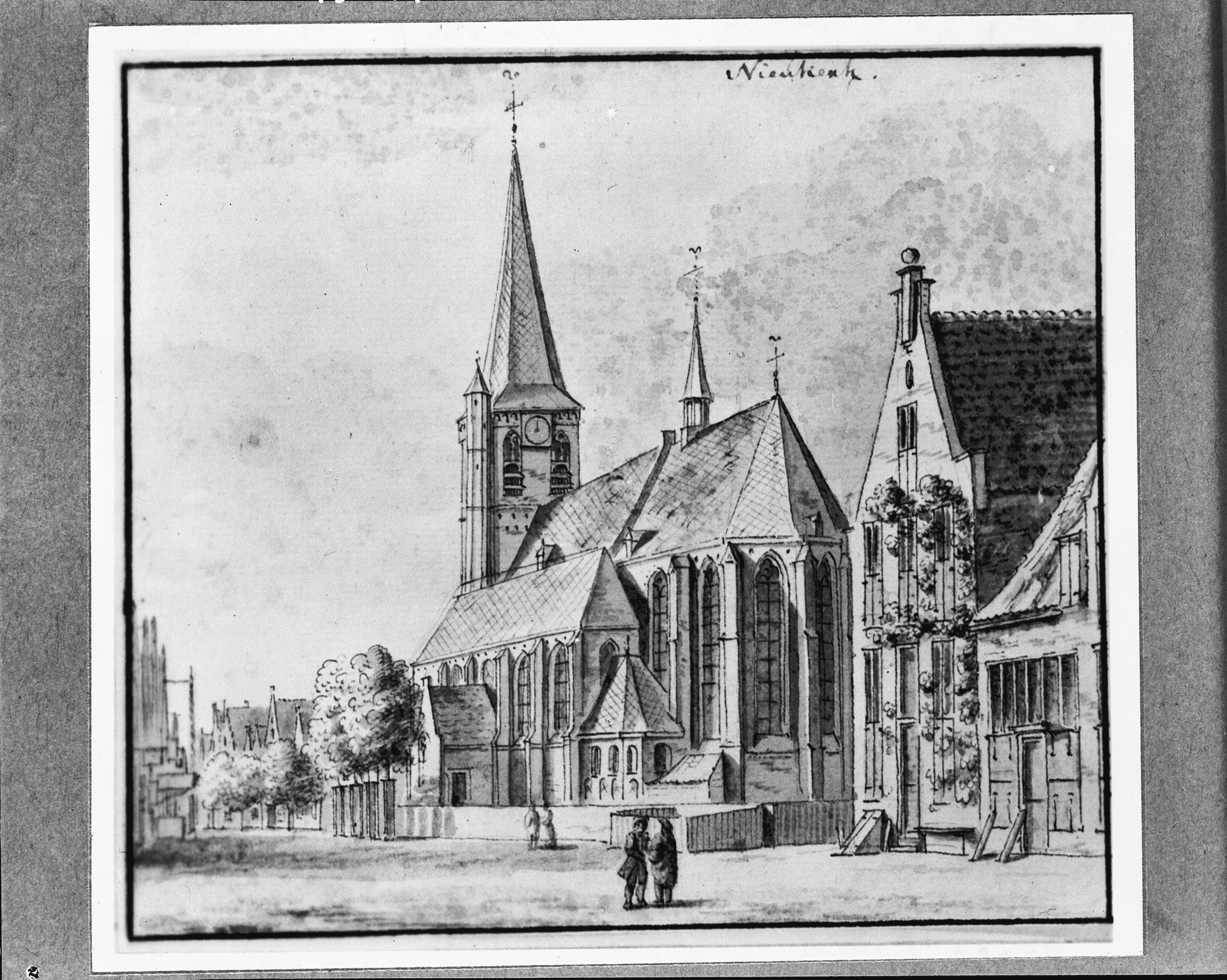 Nederlands Hervormde Kerk en Toren: Archief de Poll, 18e eeuwse tekening kerk